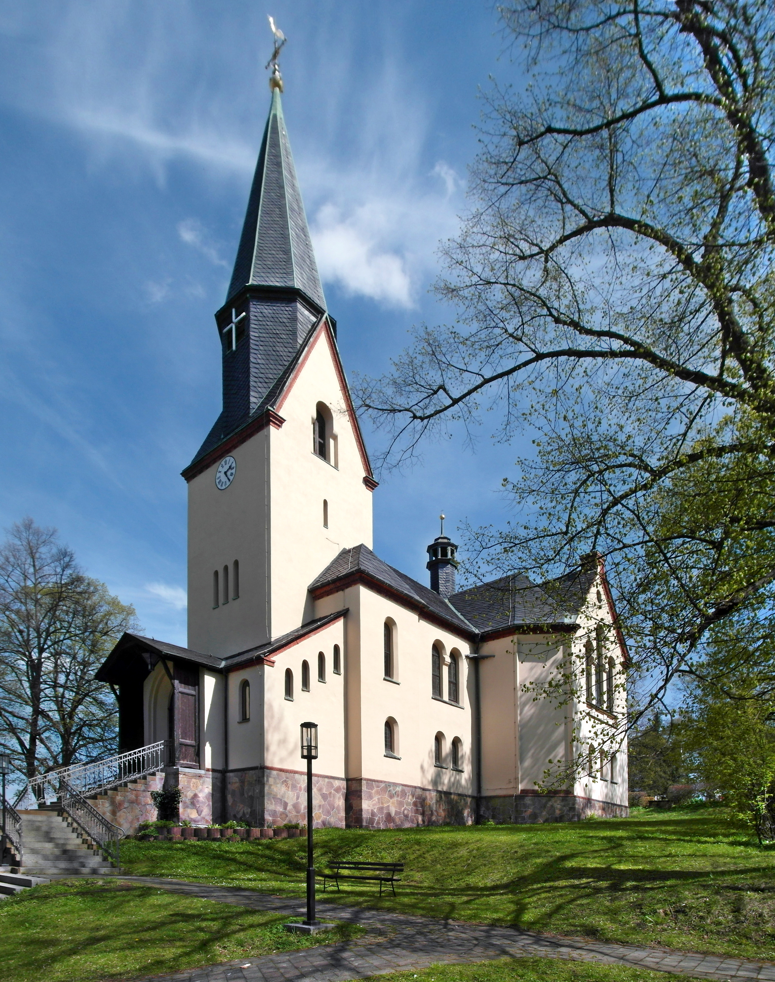 24.04.2017 09212 Kändler (Limbach-Oberfrohna), Kirchstraße 29: Lutherkirche Kändler. Die heutige Kirche wurde 1902 im Jugendstil nach Plänen des Leipziger Architekten Paul Lange erbaut. Sicht von Südwesten. [SAM9490+9492.JPG]20170424310MDR.JPG(c)Blobelt